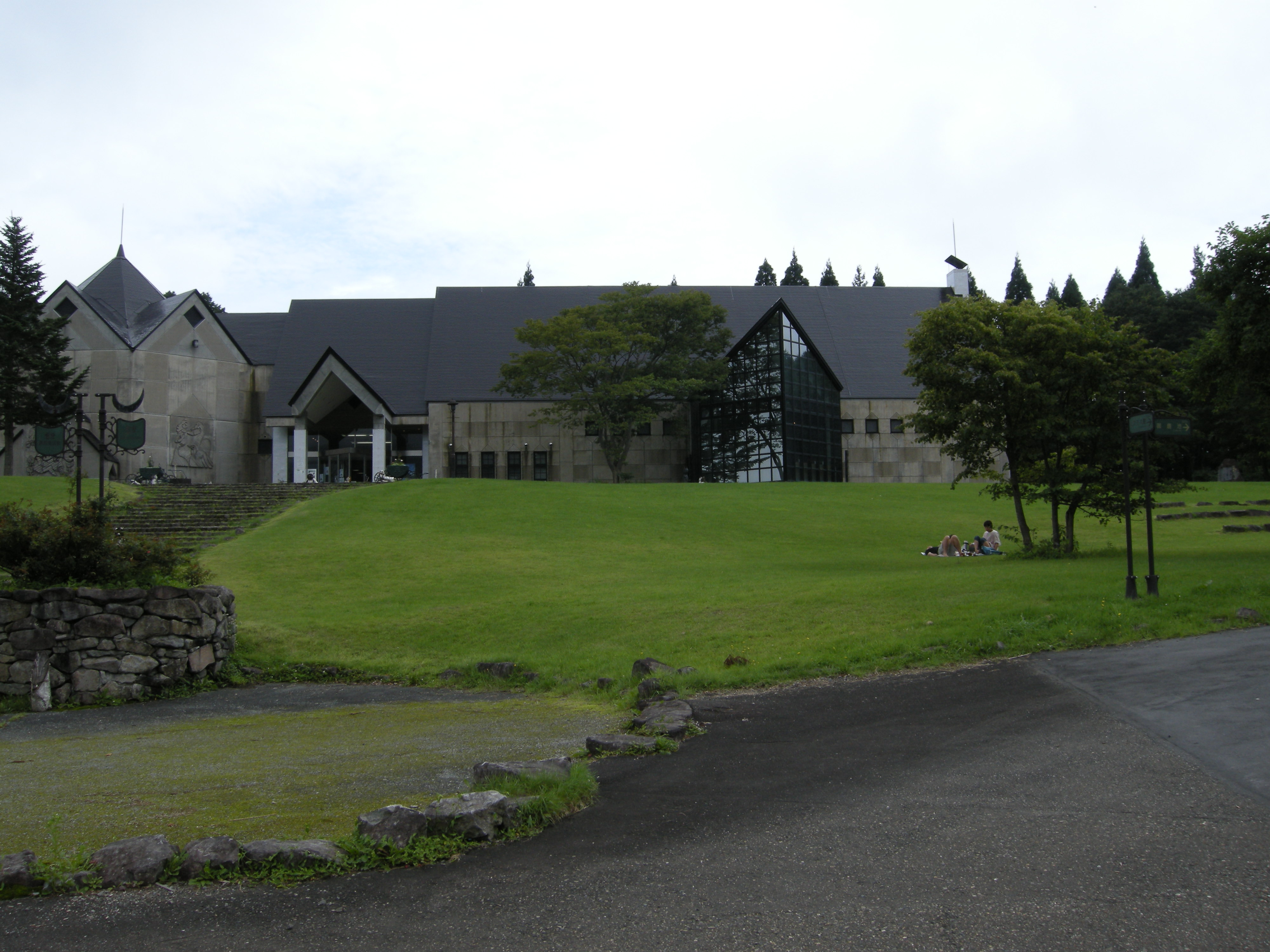 黒姫童話館の建物の正面写真です。